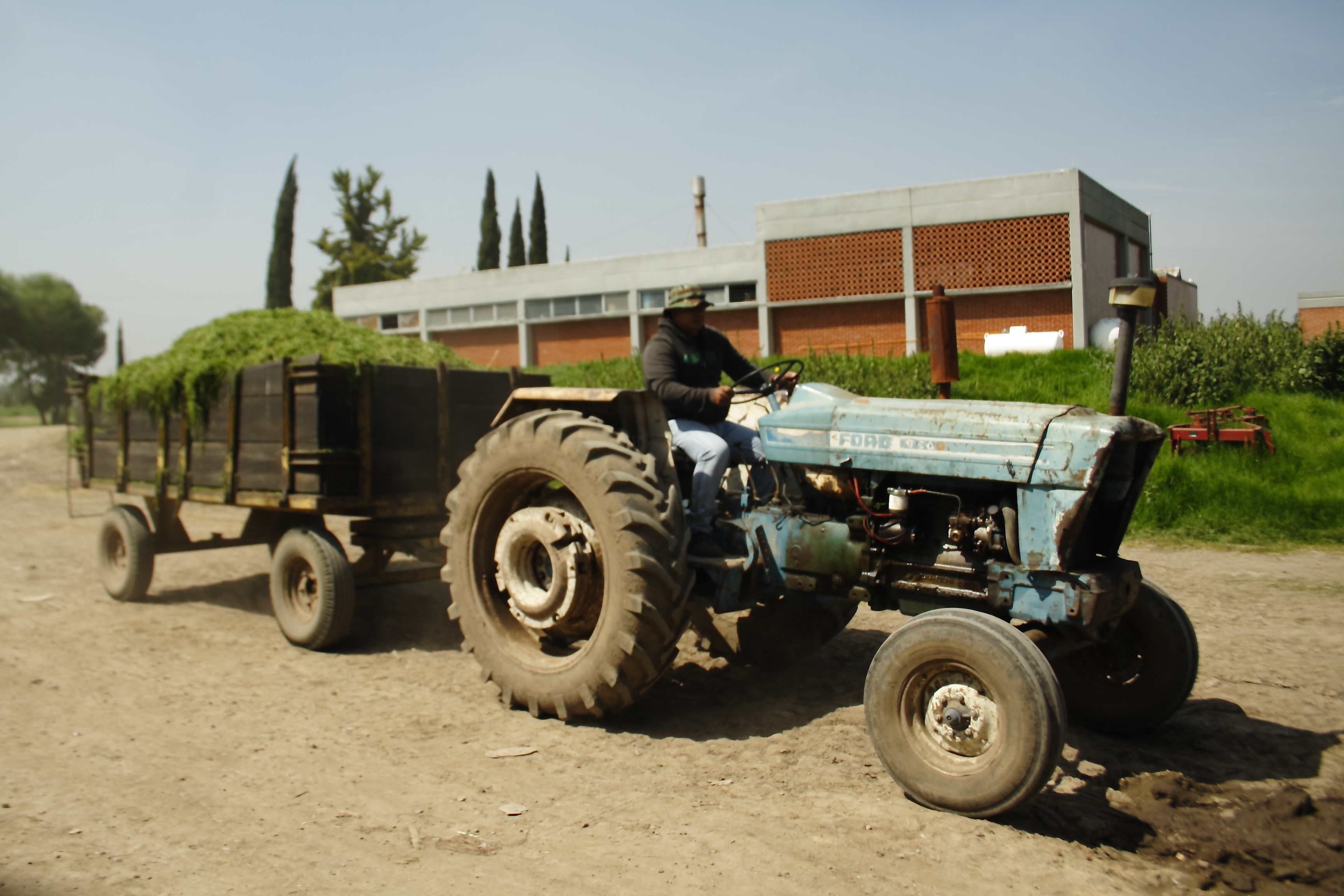 Tractor en la zona de Veterinaria de la FES-C.